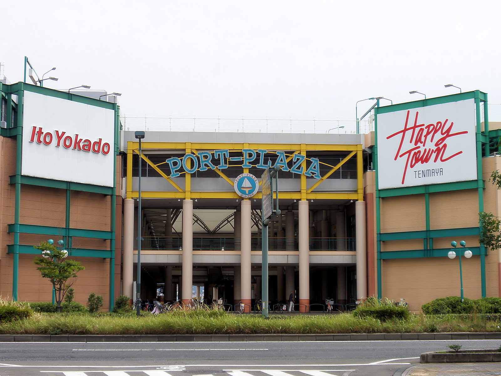 ポートプラザ日化の中央にある天満屋ハピータウンとイトーヨーカドーの看板。